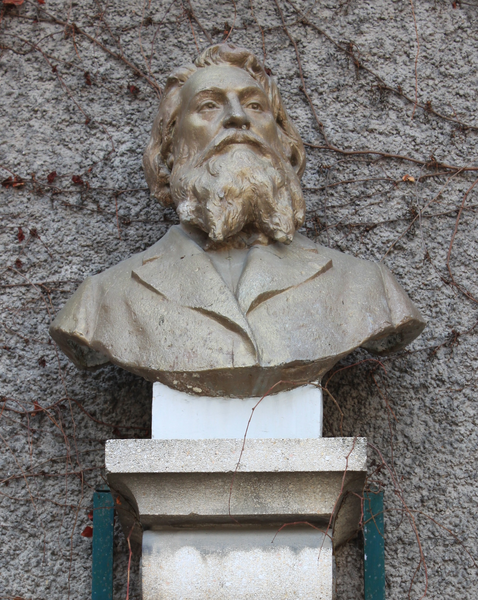 Paul Gasq (1860-1944), Monument à Paul Cabet, inauguré le 22 octobre 1933, détail, façade du beffroi de Nuits-Saint-Georges, Côte-d'Or, France.